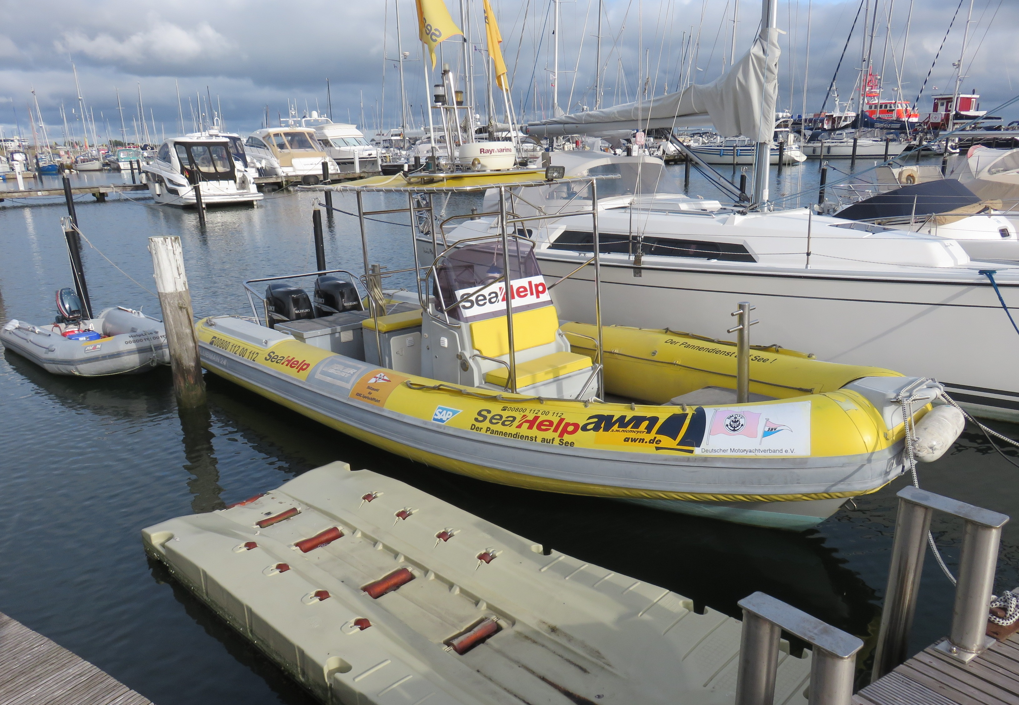 Ein Einsatzboot der 1. Generation und ein Schlauchboot des Pannendienstes Sea-Help im Yachthafen Grömitz